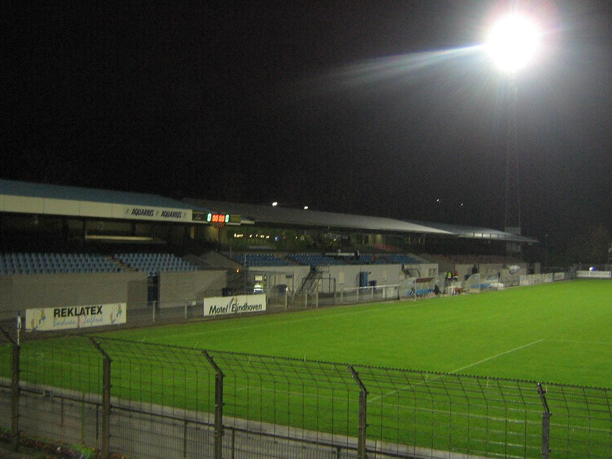 De hoofdtribune van het Jan Louwers Stadion te Eindhoven.